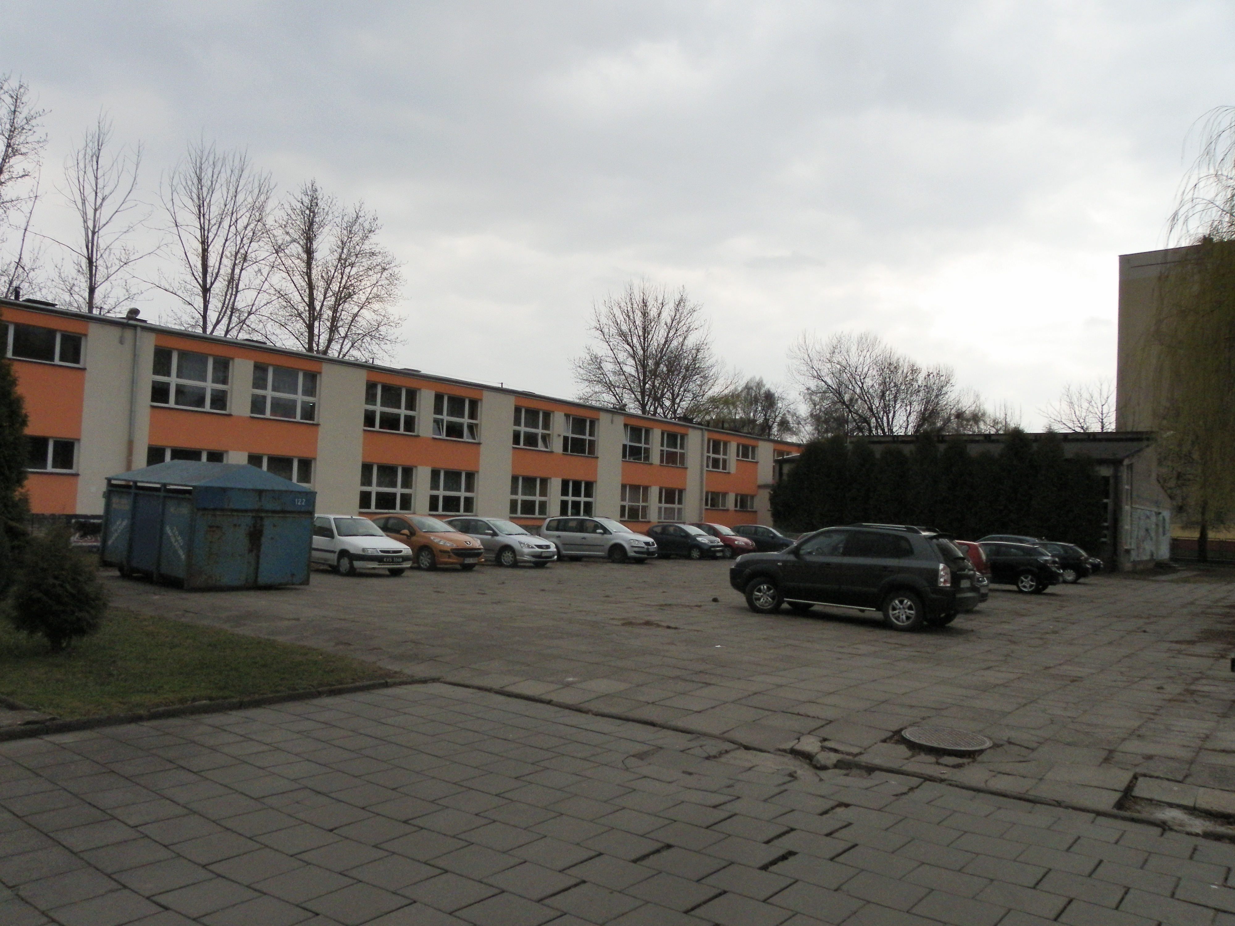 Parking dla nauczycieli przy Zespole Szkół Ogólnokształcących Integracyjnych nr 1 im. Janusza Korczaka w Krakowie przy al. Kijowskiej 3.